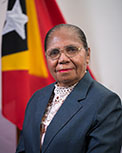 Olinda Guterres, Abgeordnete des Nationalparlaments Osttimors